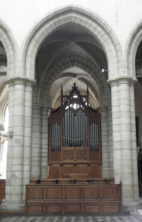 Intérieur de l'abbatiale Saint-Sauveur de Redon (35).